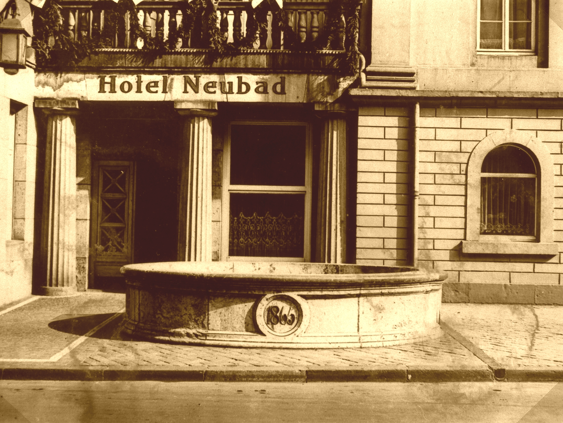 Das offene Bassin des Kochbrunnes in Burtscheid, 1866 errichtet